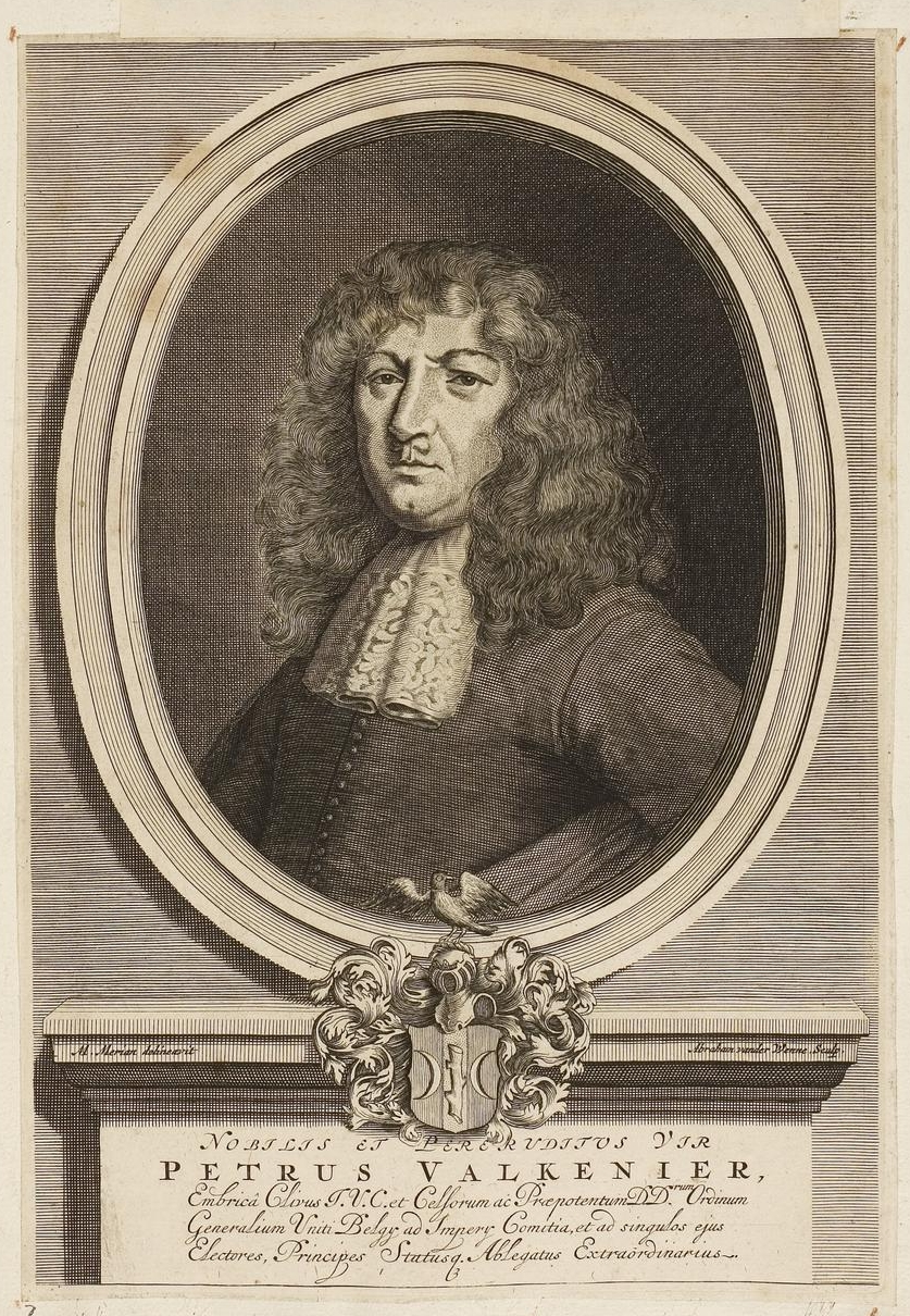 Grafik aus dem Klebeband Nr. 1 der Fürstlich Waldeckschen Hofbibliothek Arolsen Motiv: Pieter Valckenier (1638–1712), Advokat in Amsterdam; ab 1676 niederländ. Gesandter in Frankfurt am Main; ab 1690 Resident bei der Schweizer Eidgenossenschaft in Zürich GND: 122533658